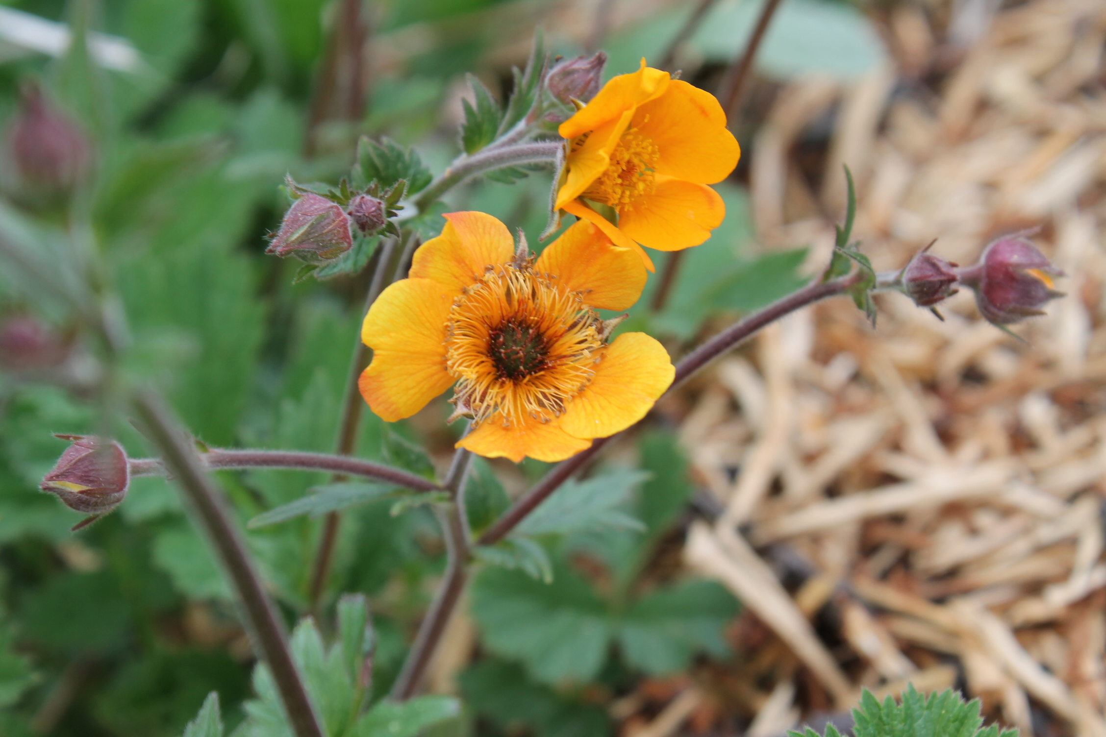 kuklík Geum × heldreichii, školní zahrada Gymnázium Brno-Řečkovice, okrasná rostlina